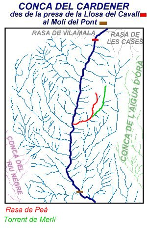 Mapa d'un fragment de la Conca del Cardener (de la presa de la Llosa del Cavall al Molí del Pont) on hi apareixen remarcades la Rasa de Peà i el Torrent de Merlí.